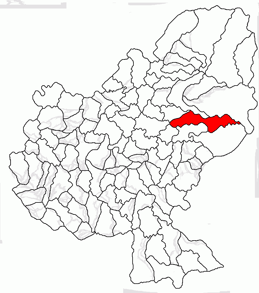 Categorie:Hărţi ale judeţului Mureş